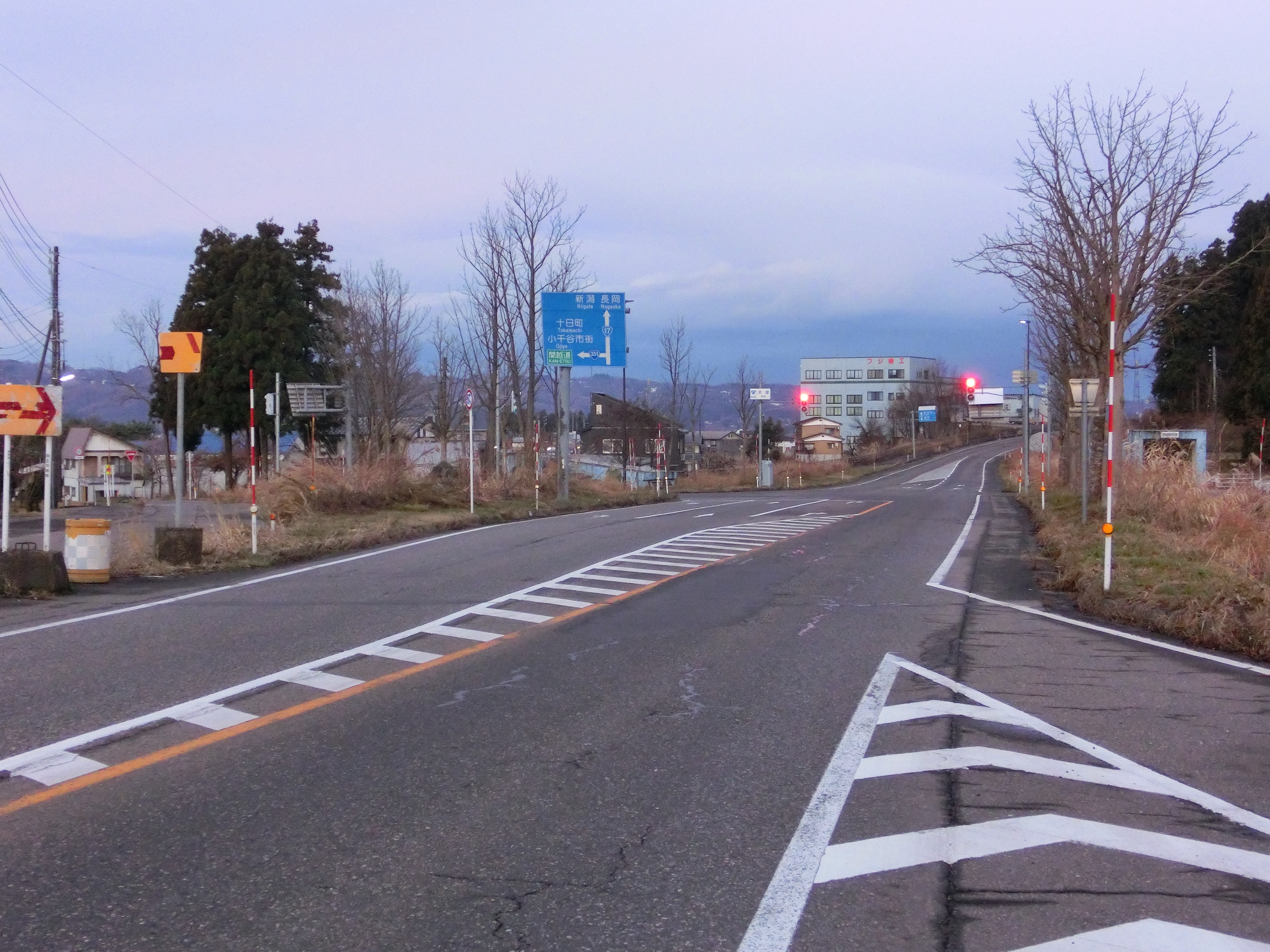 この画像は2017年12月10日早朝、新潟県小千谷市（一般国道17号線上）にて撮影された木津交差点の写真。